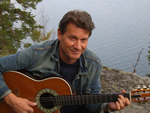 Näyttelijä FIA, muusikko, näytelmäkirjailija.